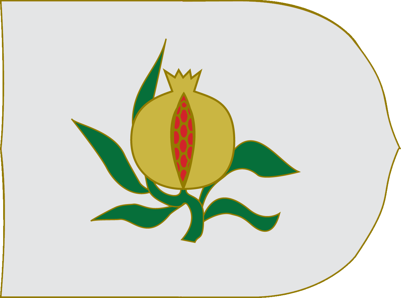 Estandarte del Reino de Granada (época de dominio cristiano), creado a partir de Image:Escudo del reino de Granada.png y de Image:Estandarte de la Corona de Castilla.png